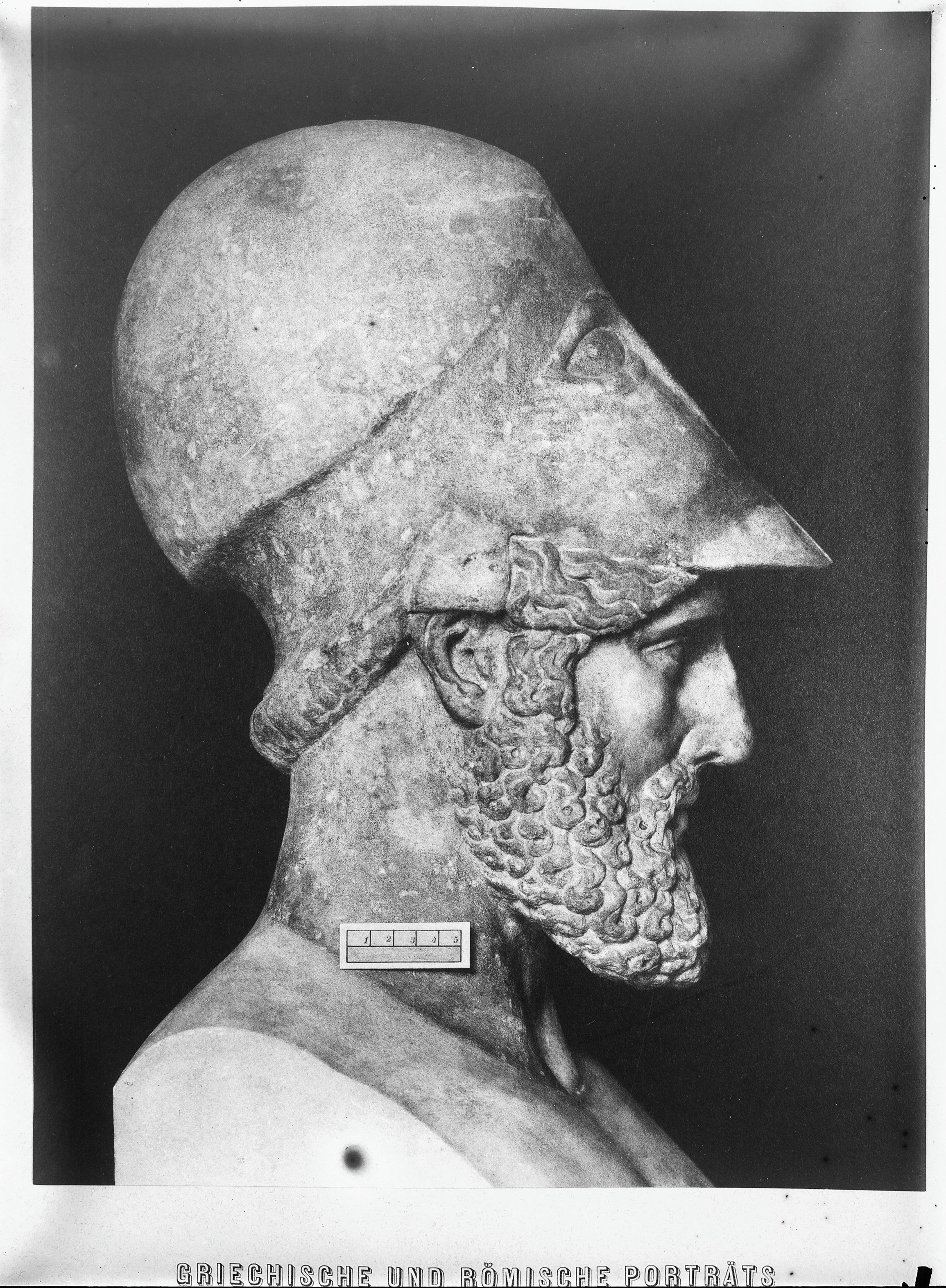 Beeld: Beeld, Themistocles (opmerking: Reproductie van foto)